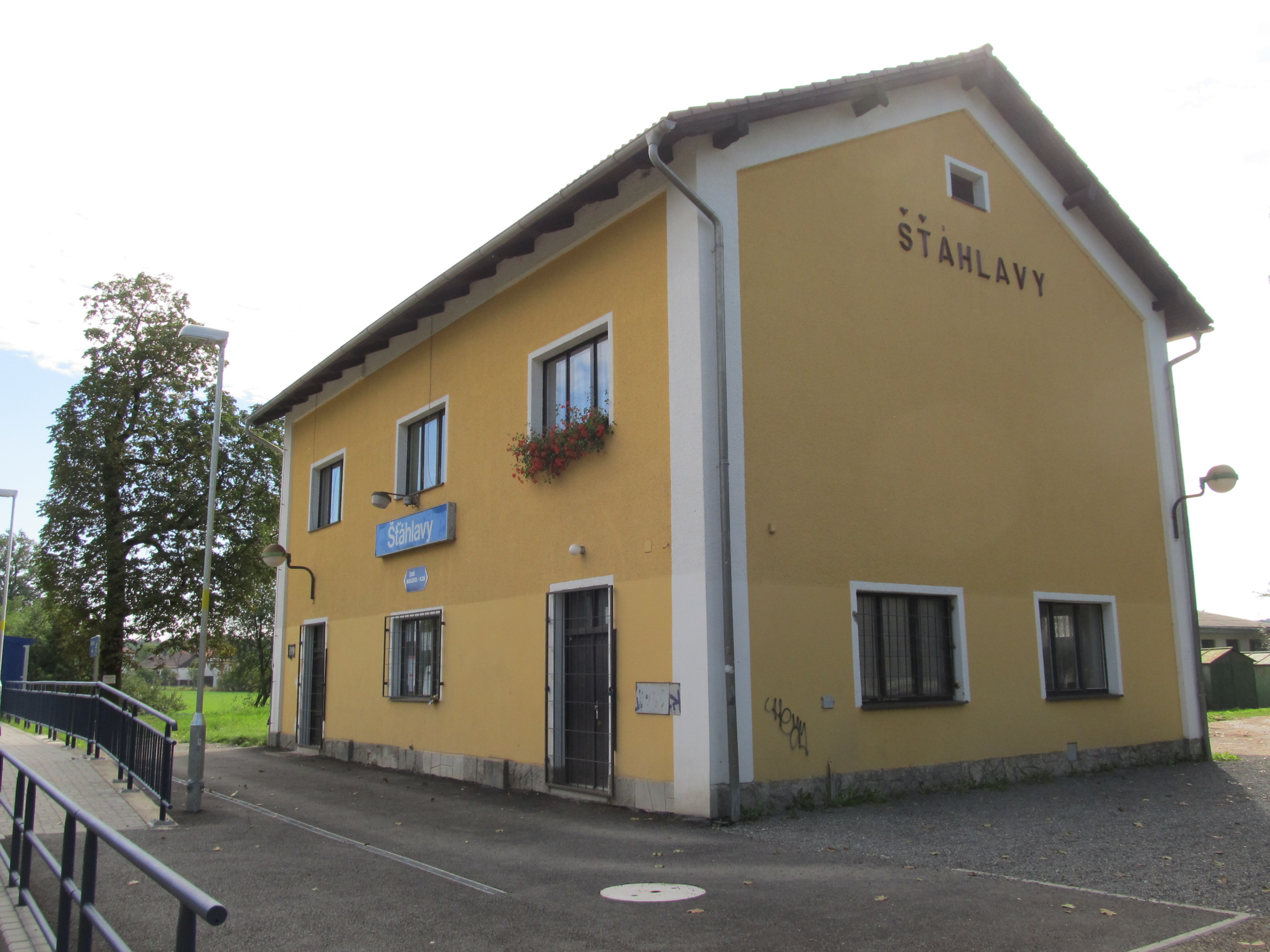 Šťáhlavy žst